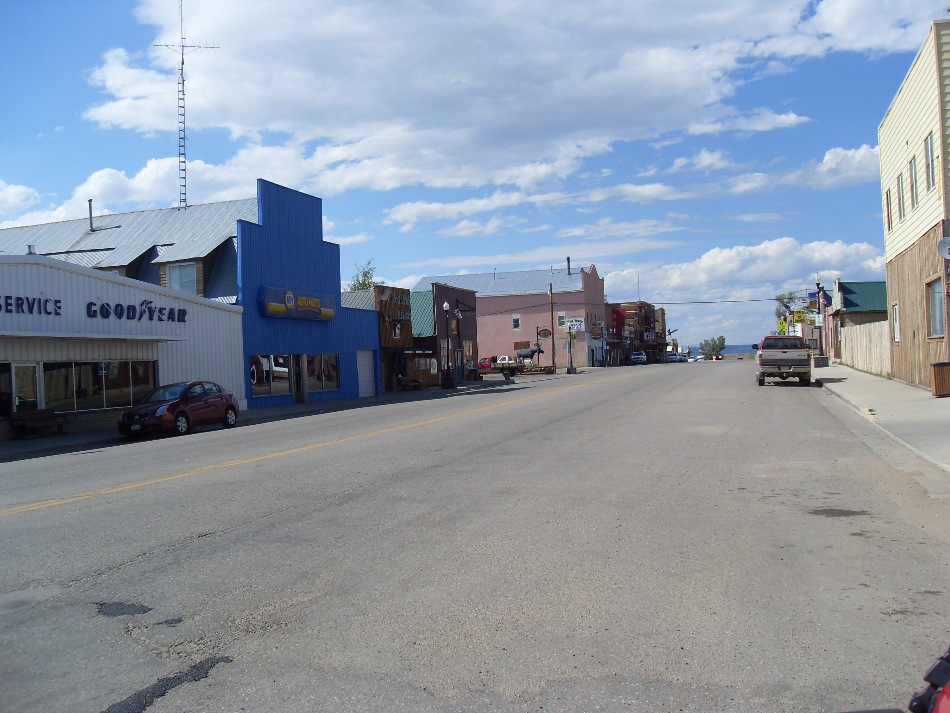 Main street Walden, Colorado